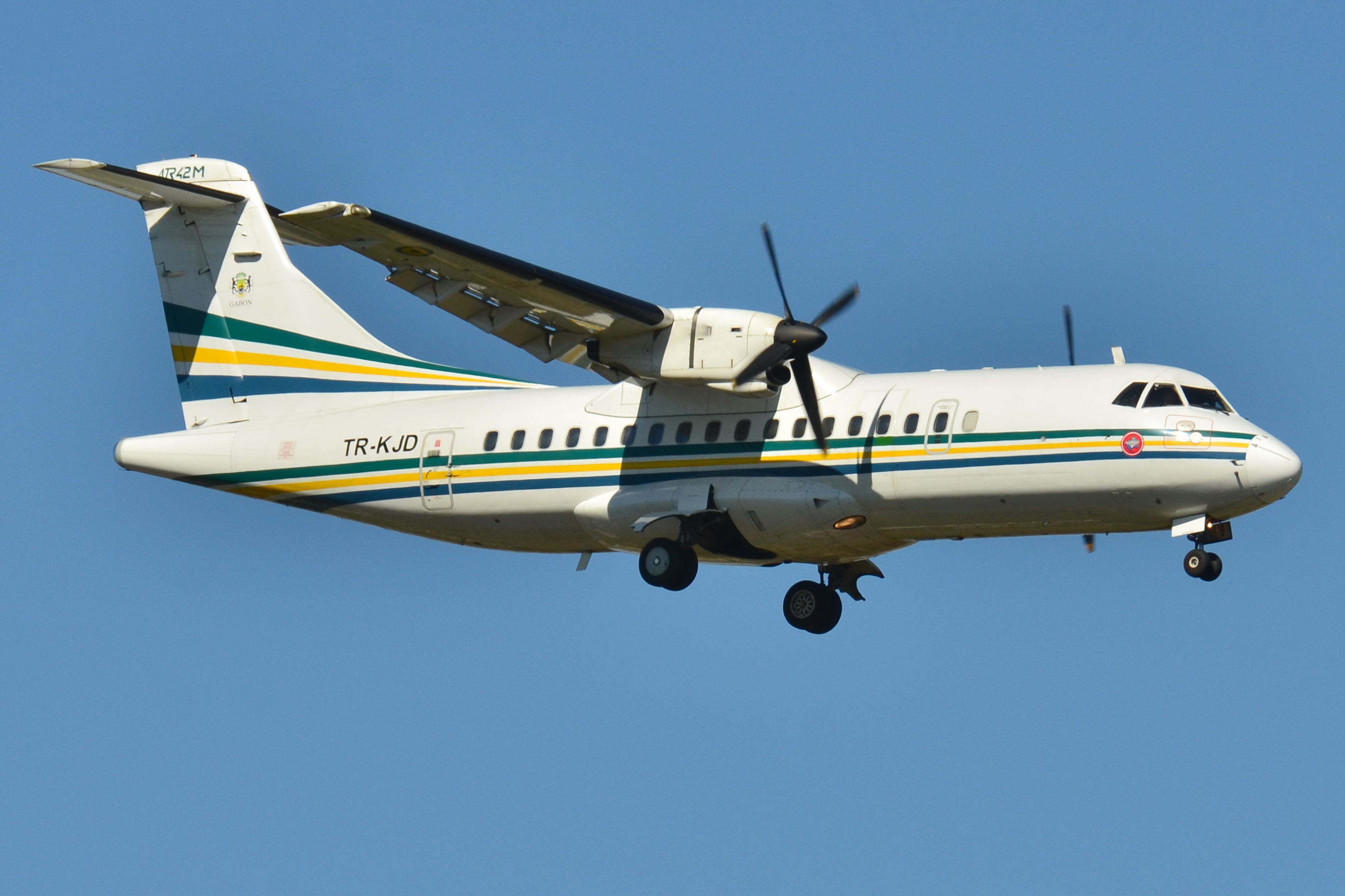 Photo prise à l'aéroport de Toulouse-Blagnac (LFBO) en France. Picture take at Toulouse-Blagnac Airport (LFBO) in France.